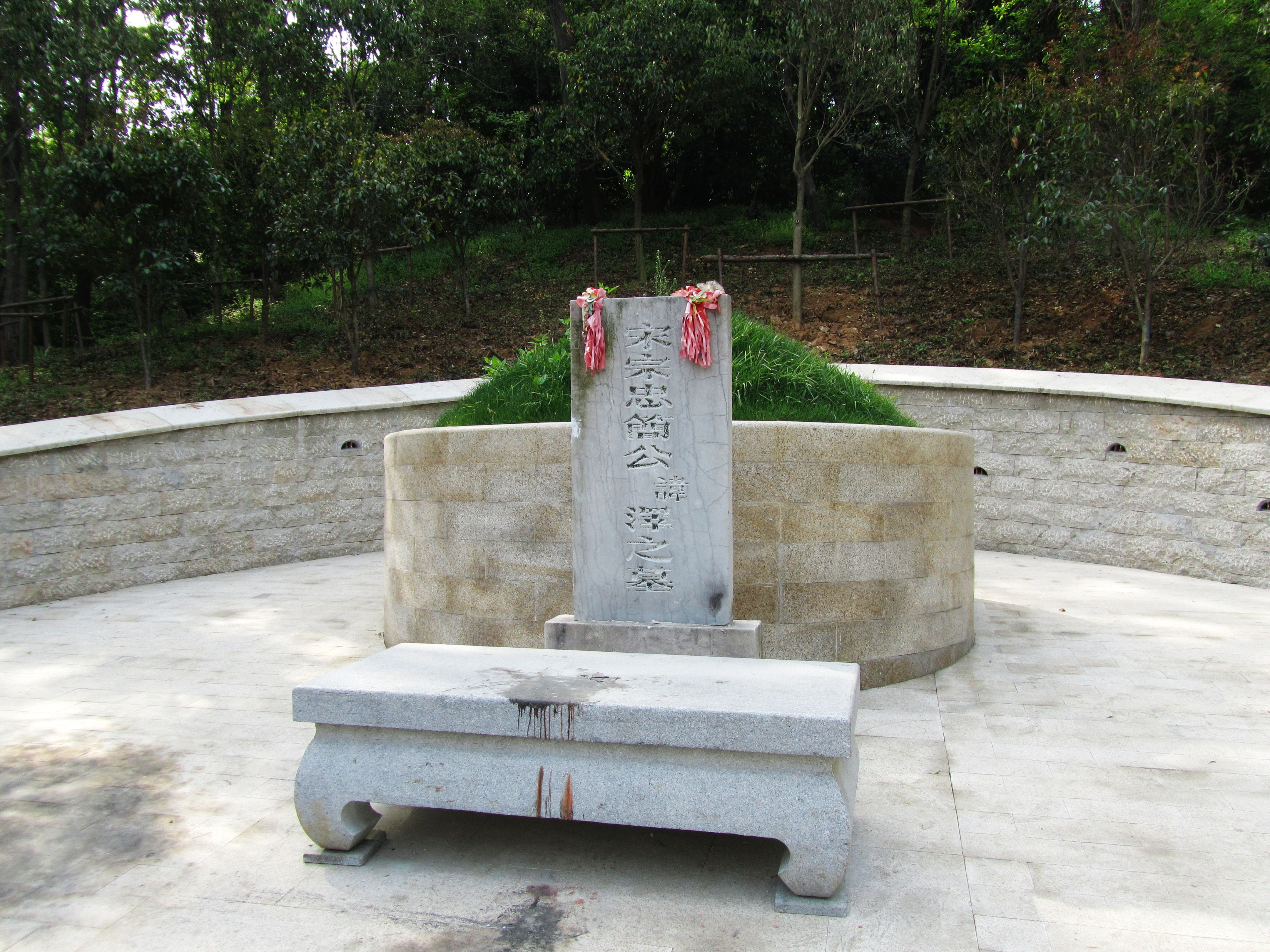 镇江京岘山宗泽墓墓冢。